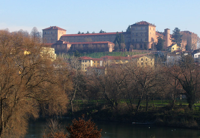 Castello Reale - Moncalieri 12/2006